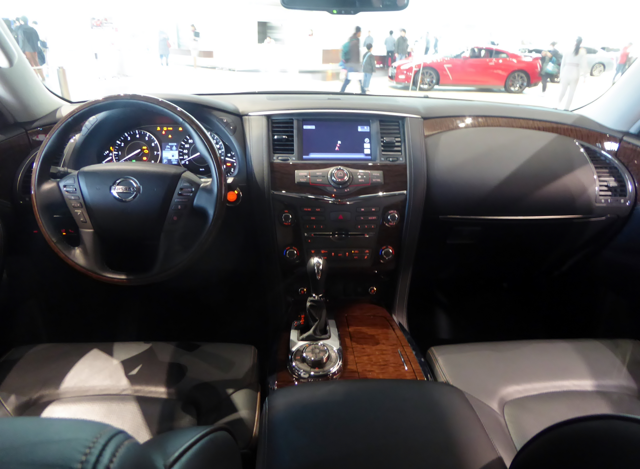 Y62型日産・パトロールのインテリアを撮影。